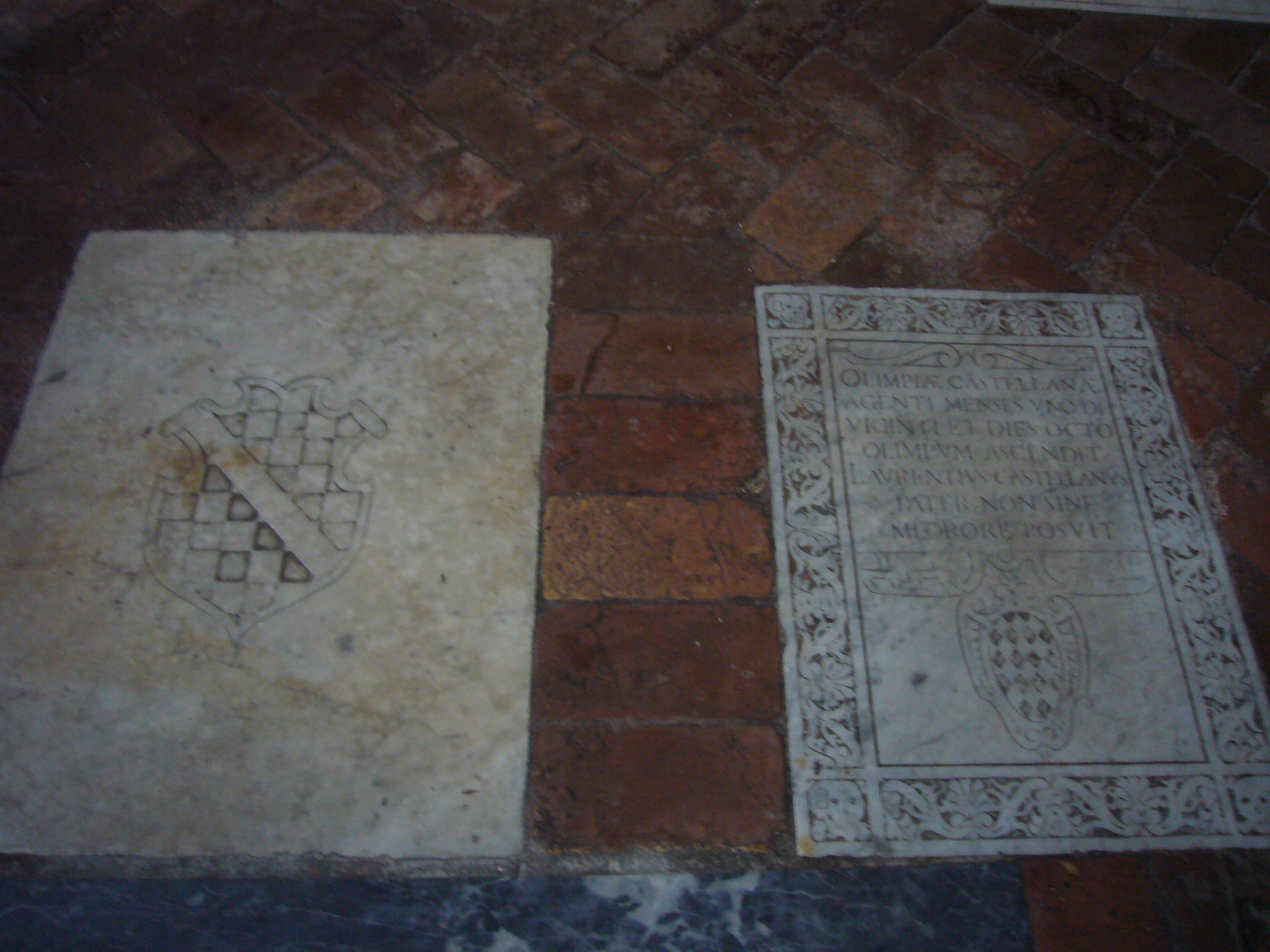 Roma, san Benedetto in Piscinula, arme dei Mattei di Piscinula e lapide Castellani